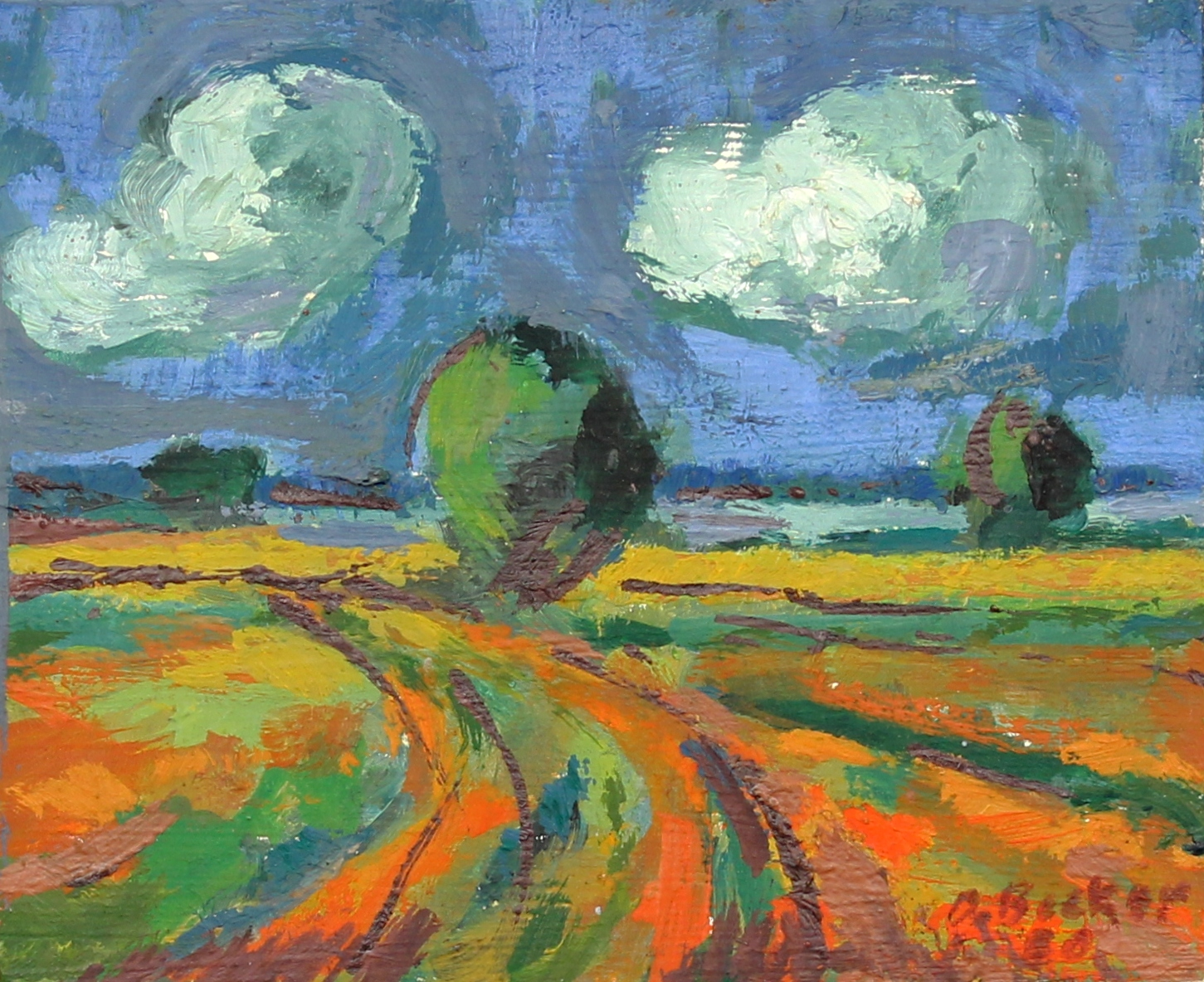 Landschaft Ostsee